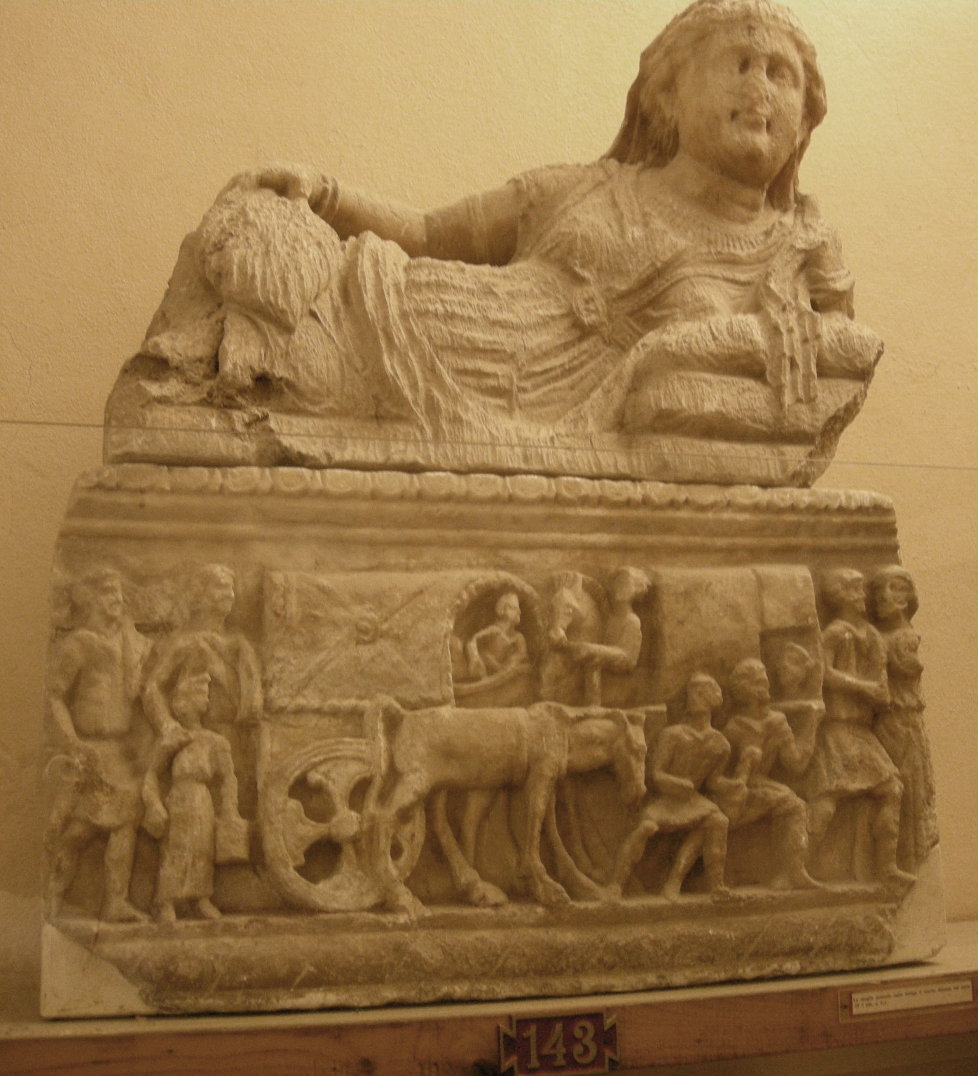 Museo guarnacci, urnetta etrusca seconda serie